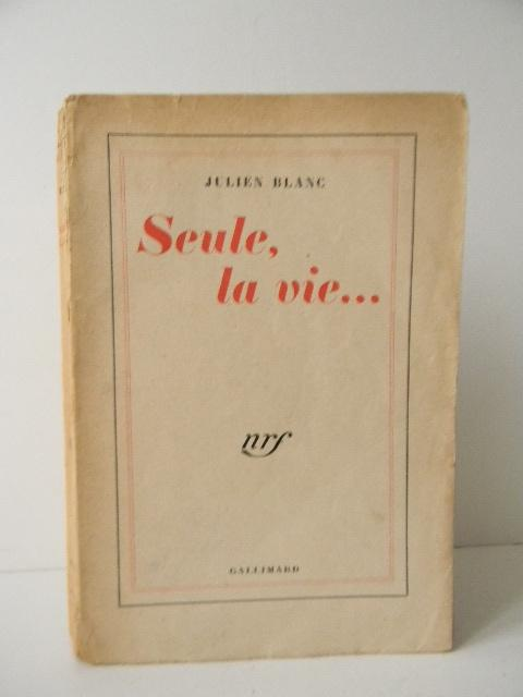 Seule-la-vie-1943